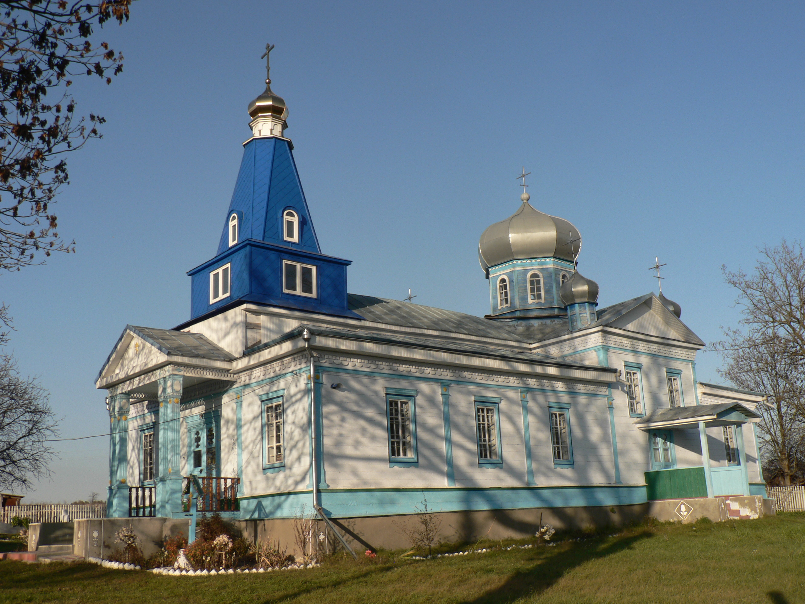 Wooden Church Zhabokrych Ukraine